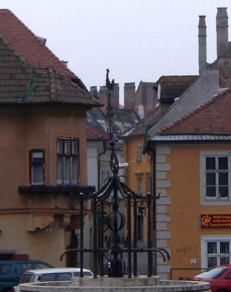 A győri Káposztás köz (Győr-Moson-Sopron megye)